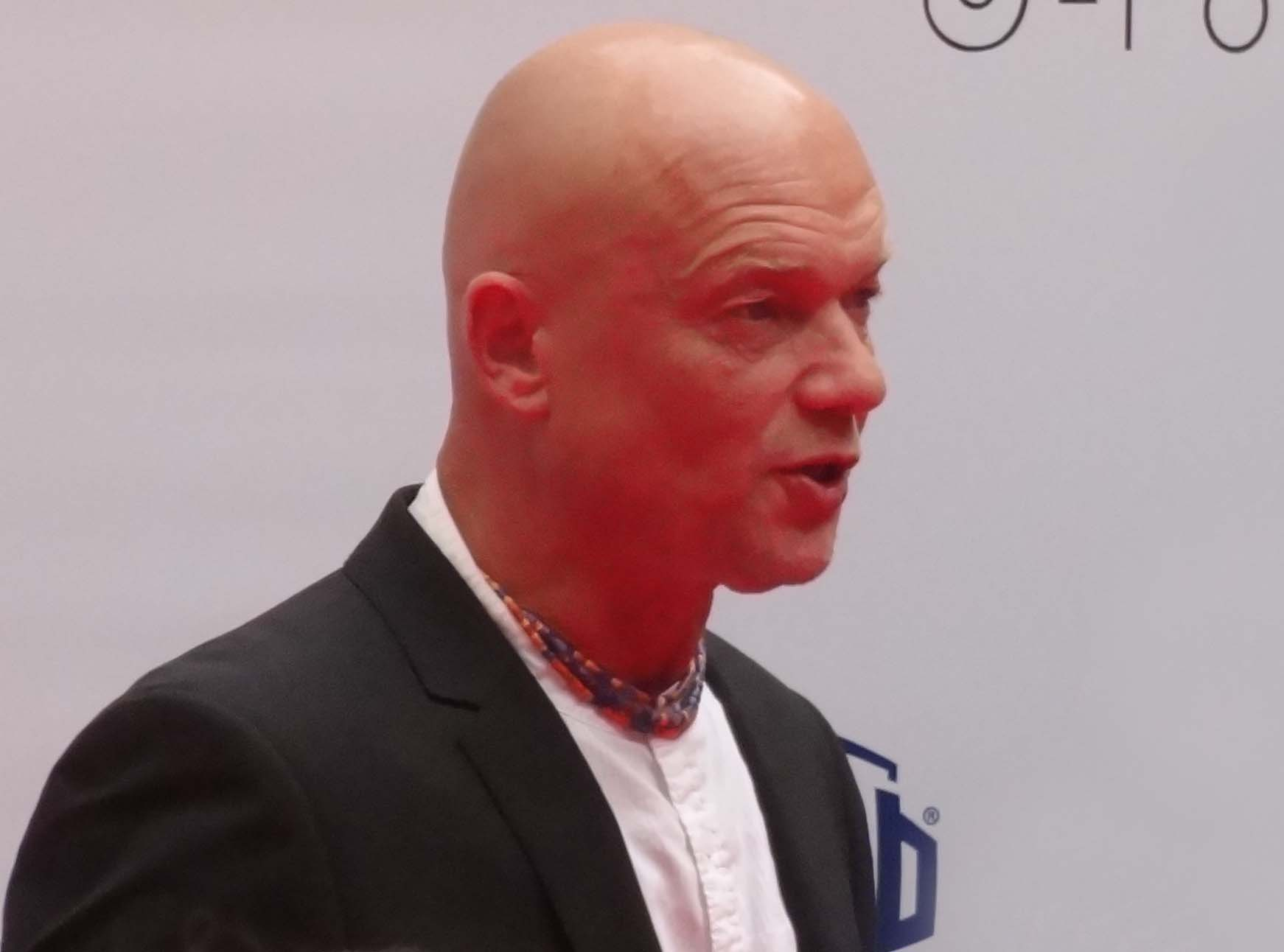 Андрей Смоляков на кинофестивале «Кинотавр» в Сочи, 2015 год.